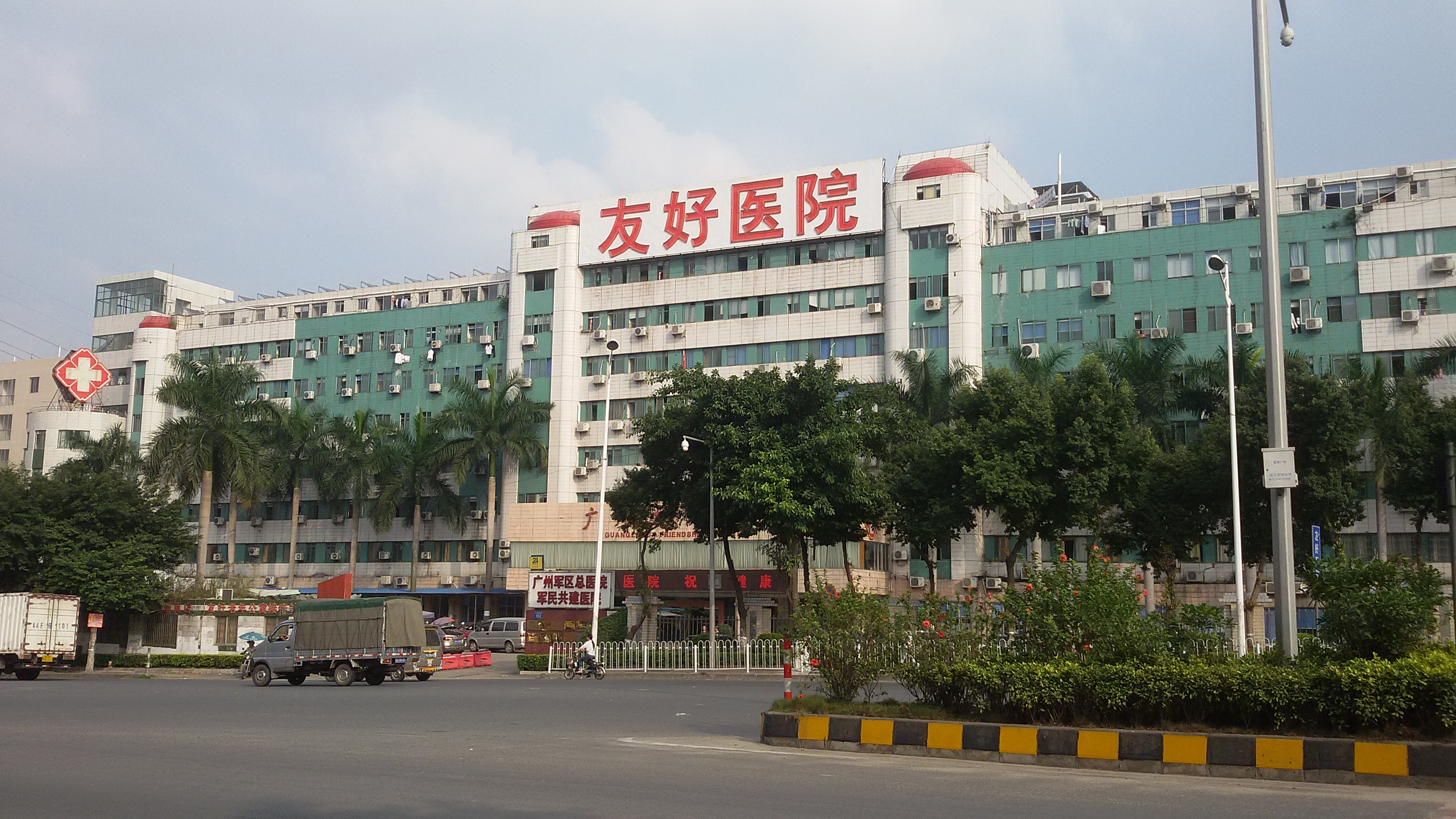 粵語: 广州友好医院